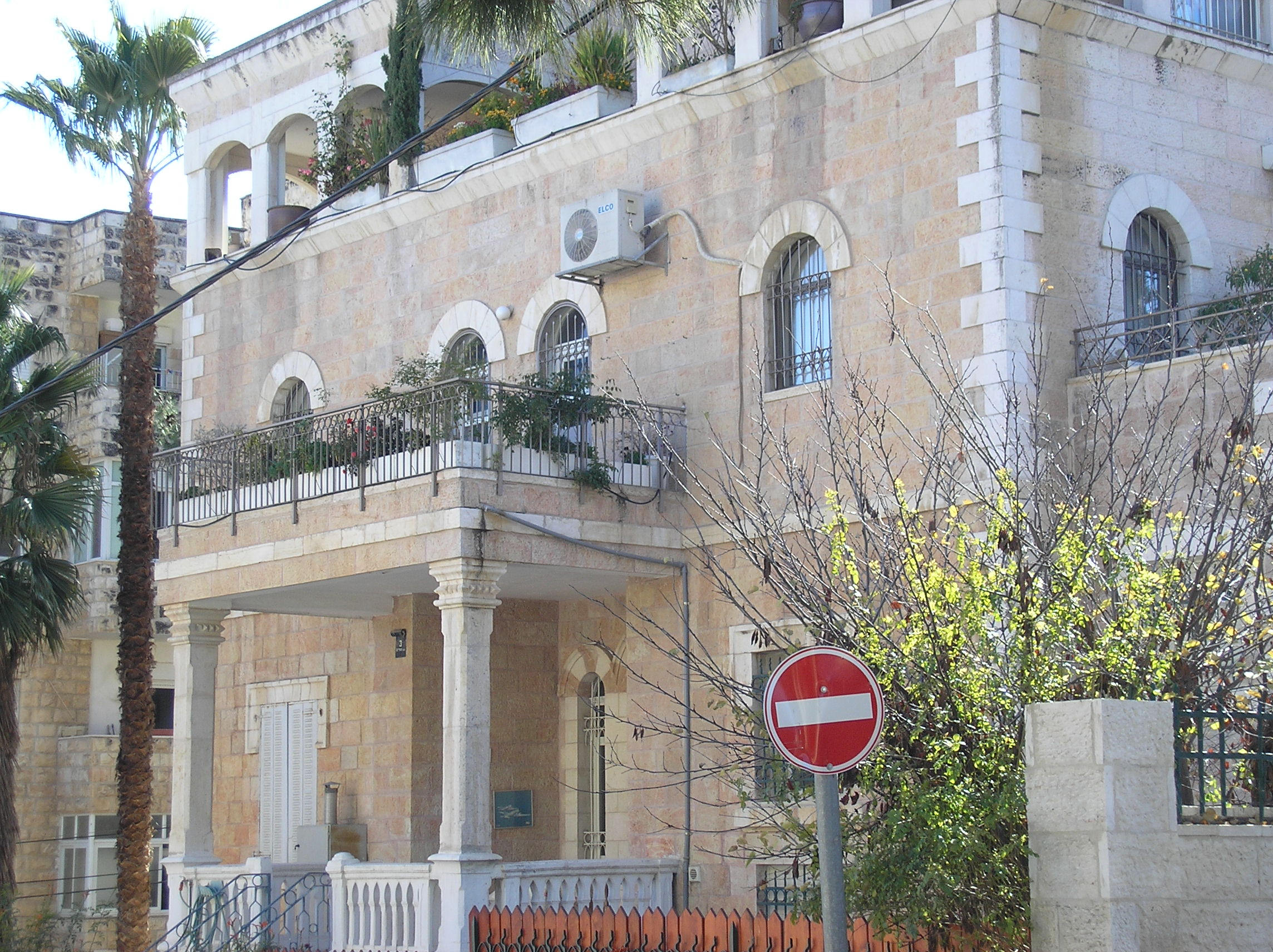 Katamon